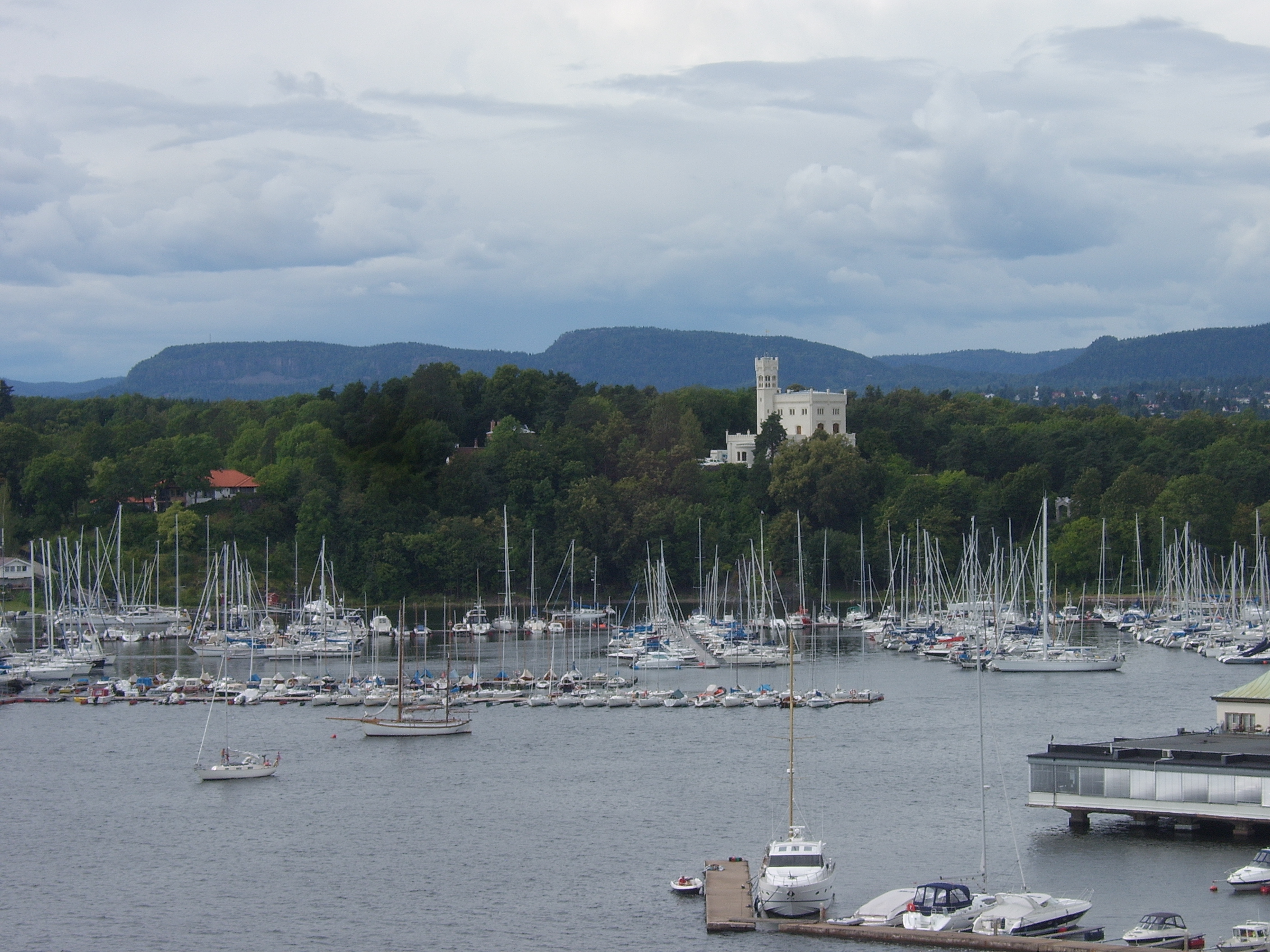 Oslo, Norway